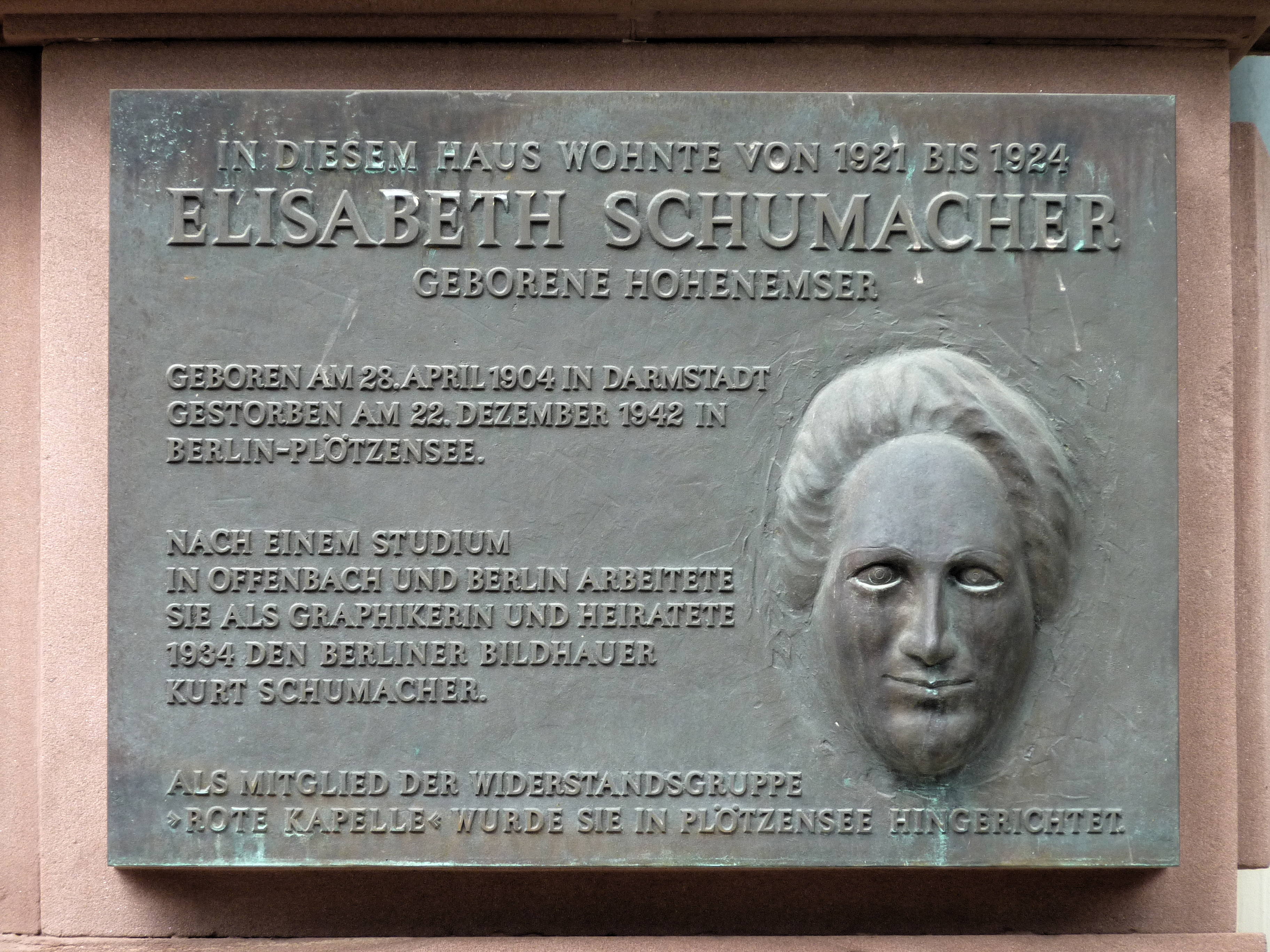 Gedenktafel für Elisabeth Schumacher an ihrem Wohnhaus im Kettenhofweg Nr. 46 in Frankfurt am Main, Stadtteil Westend-Süd. Enthüllt am 29. April 1994. Bronzetafel mit Portrait, 62x65 cm, gestaltet von Günter Maniewski. Inschrift (Interpunktion teilweise hinzugefügt): „In diesem Haus wohnte von 1921 bis 1924 Elisabeth Schumacher, geborene Hohenemser. Geboren am 28. April 1904 in Darmstadt, gestorben am 22. Dezember 1942 in Berlin-Plötzensee. Nach einem Studium in Offenbach und Berlin arbeitete sie als Graphikerin und heiratete 1934 den Berliner Bildhauer Kurt Schumacher. Als Mitglied der Widerstandsgruppe »Rote Kapelle« wurde sie in Plötzensee hingerichtet.“